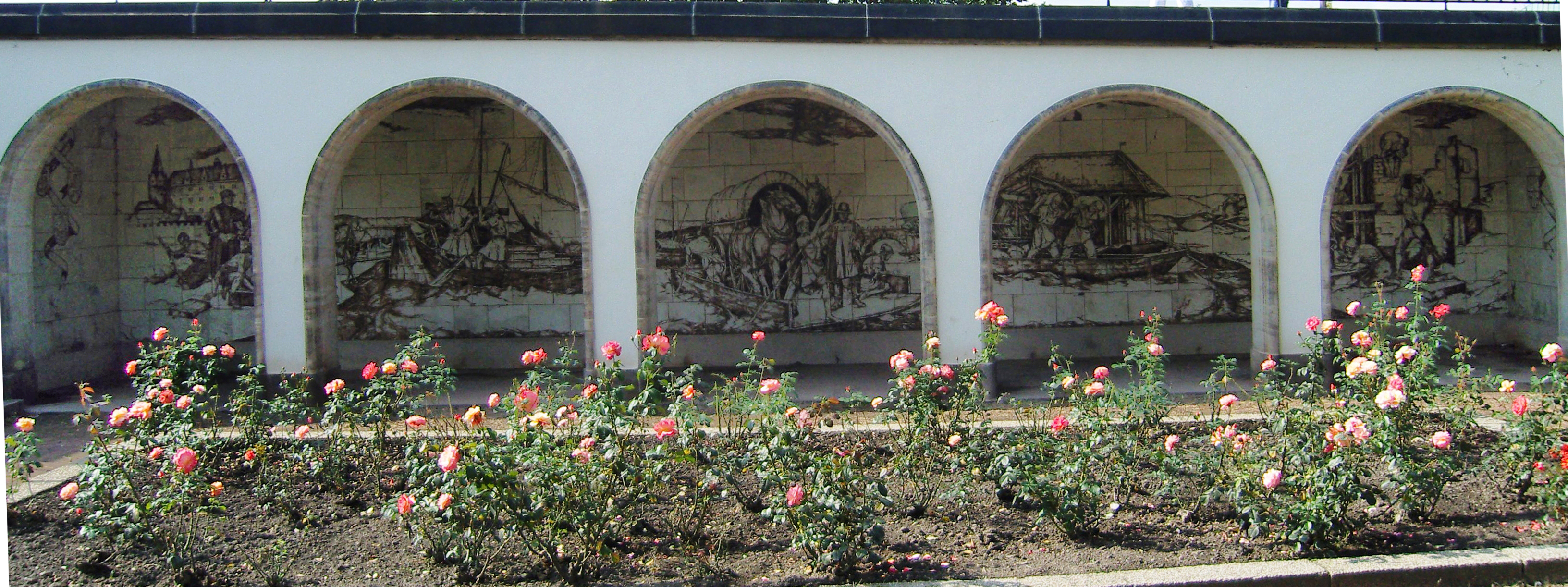 Sgraffito an der Augustusbrücke in Dresden von Hans Nadler, dargestellt sind Episoden aus der Dresdner Geschichte sowie Elbfähren und eine Schiffsmühle